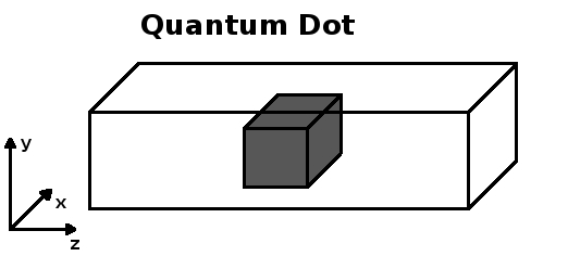 Punto quantico. Schema di eterostruttura di dimensioni nanometriche che da luogo ad effetti quantistici.